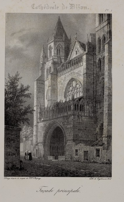 Dijon, Saint-Benigne (Westfassade)